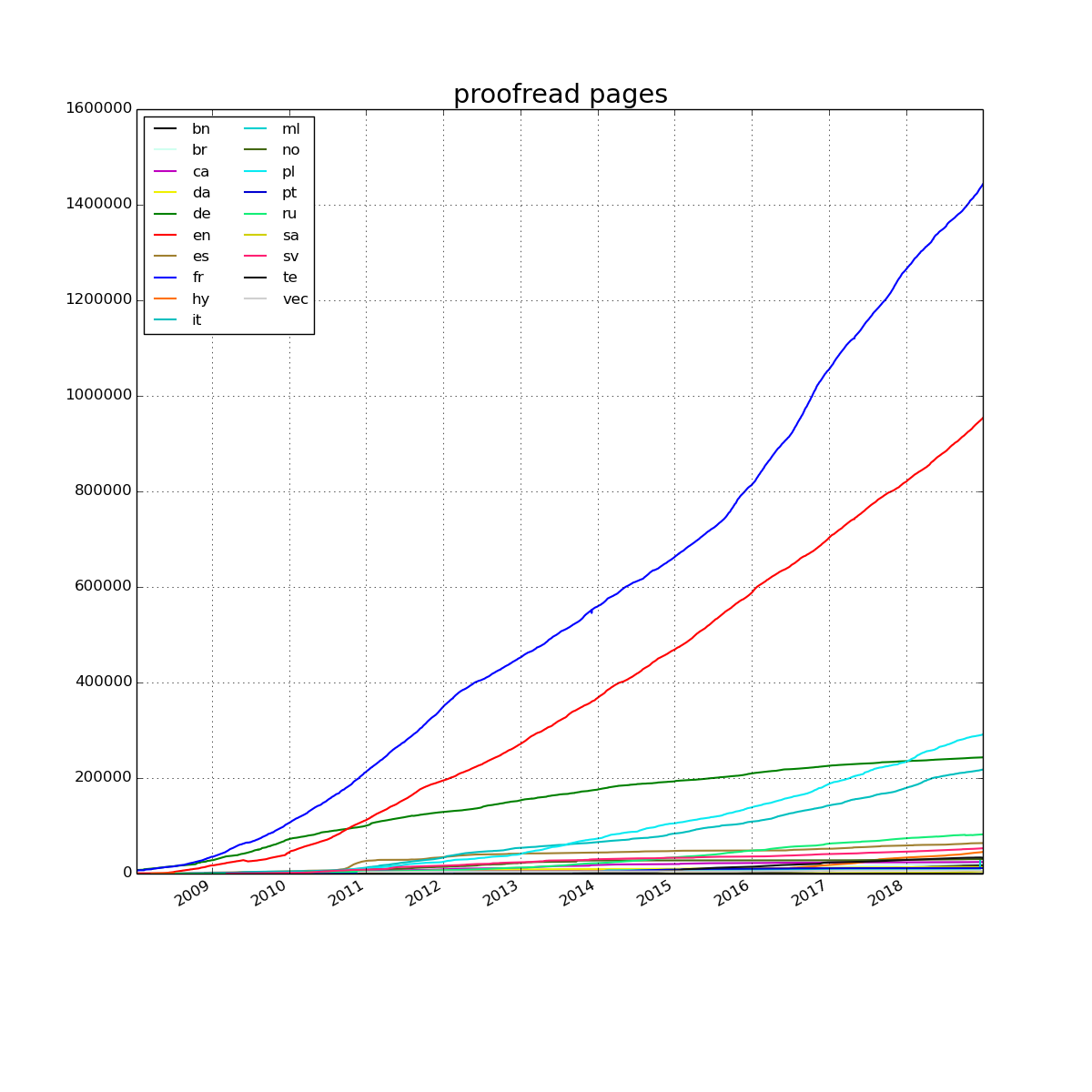 Nombre total de pages corrigées sur Wikisource jusqu'au 1er janvier 2019